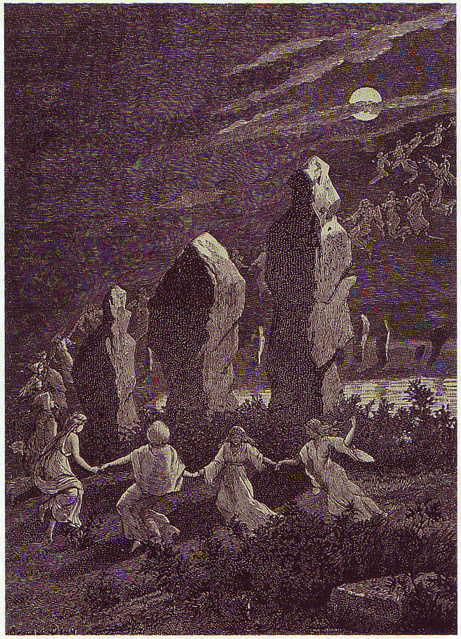 La danse des korriganes